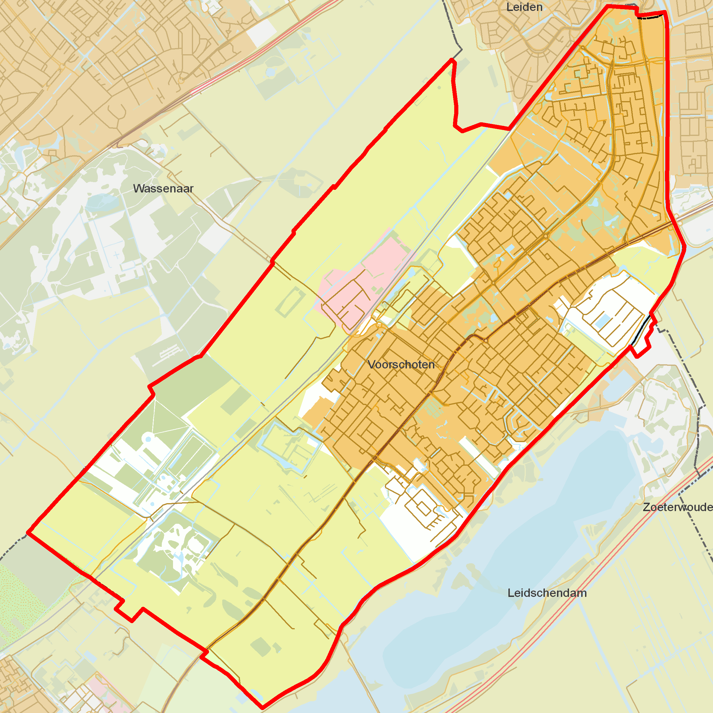 BAG woonplaatsen - Gemeente Voorschoten.png